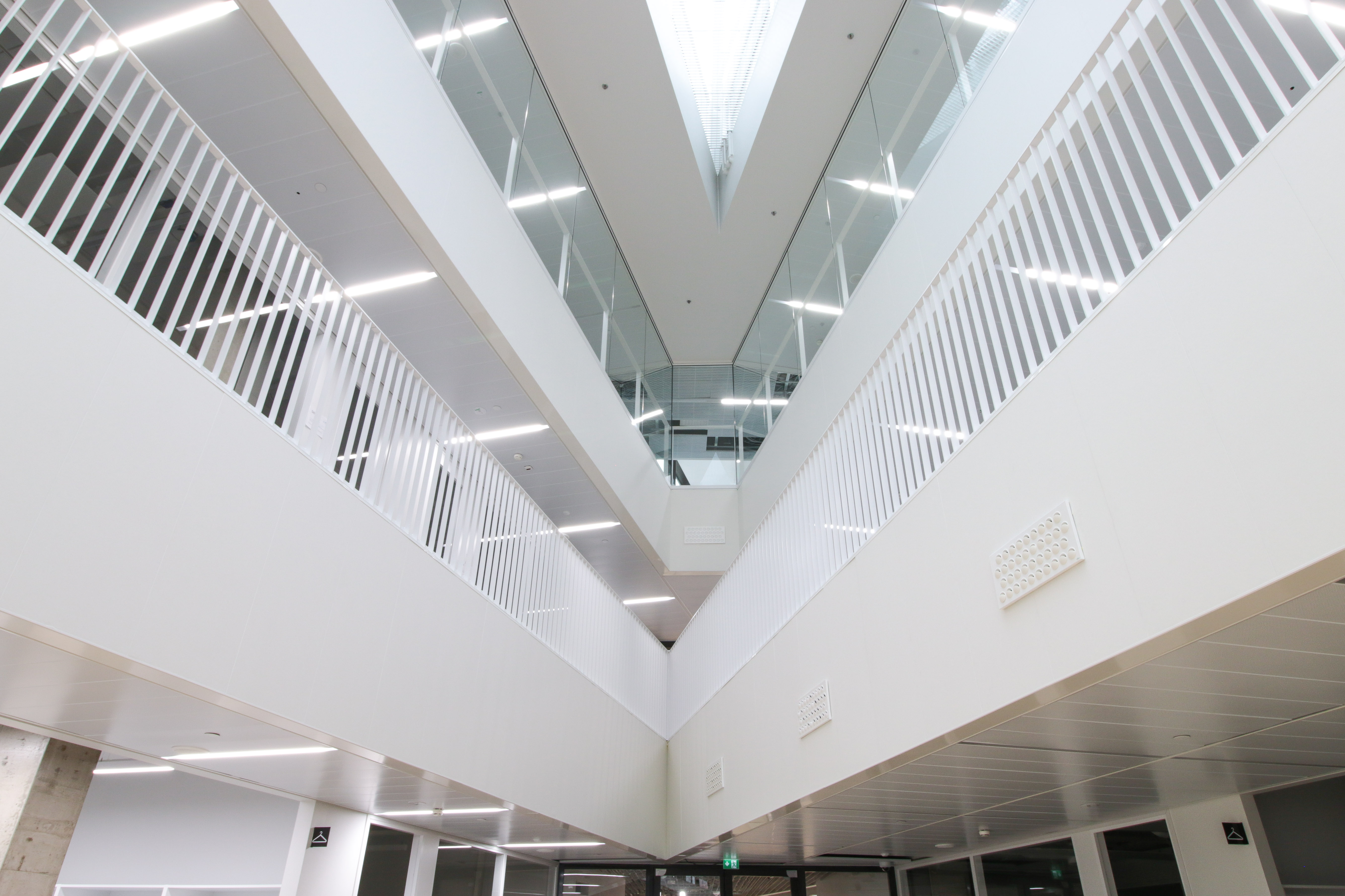 Aalto-yliopiston taiteiden ja suunnittelun korkeakoulun uudisrakennus Väre.